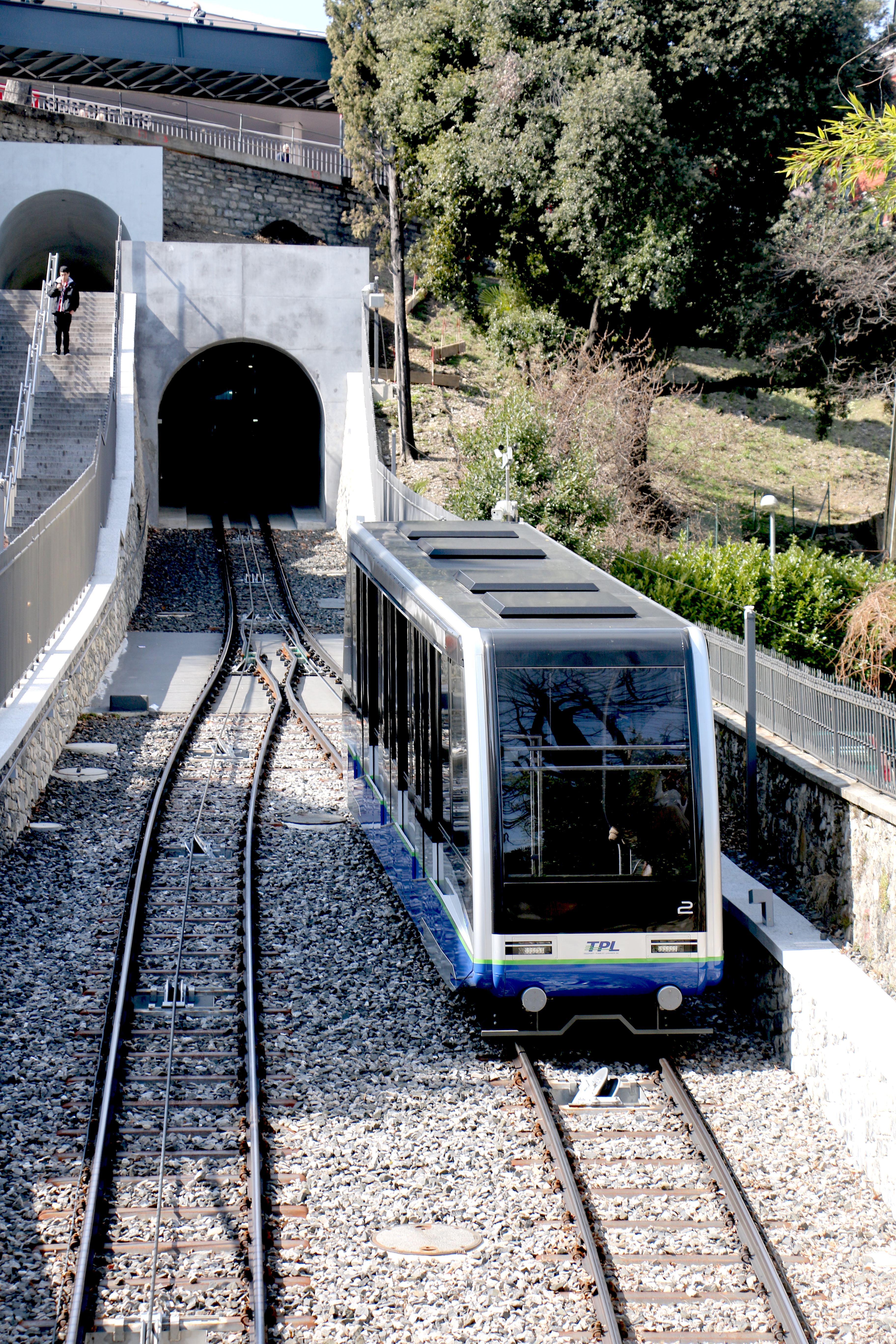 Standseilbahn Lugano, TPL "Trasporti Pubblici Luganesi" (2017)